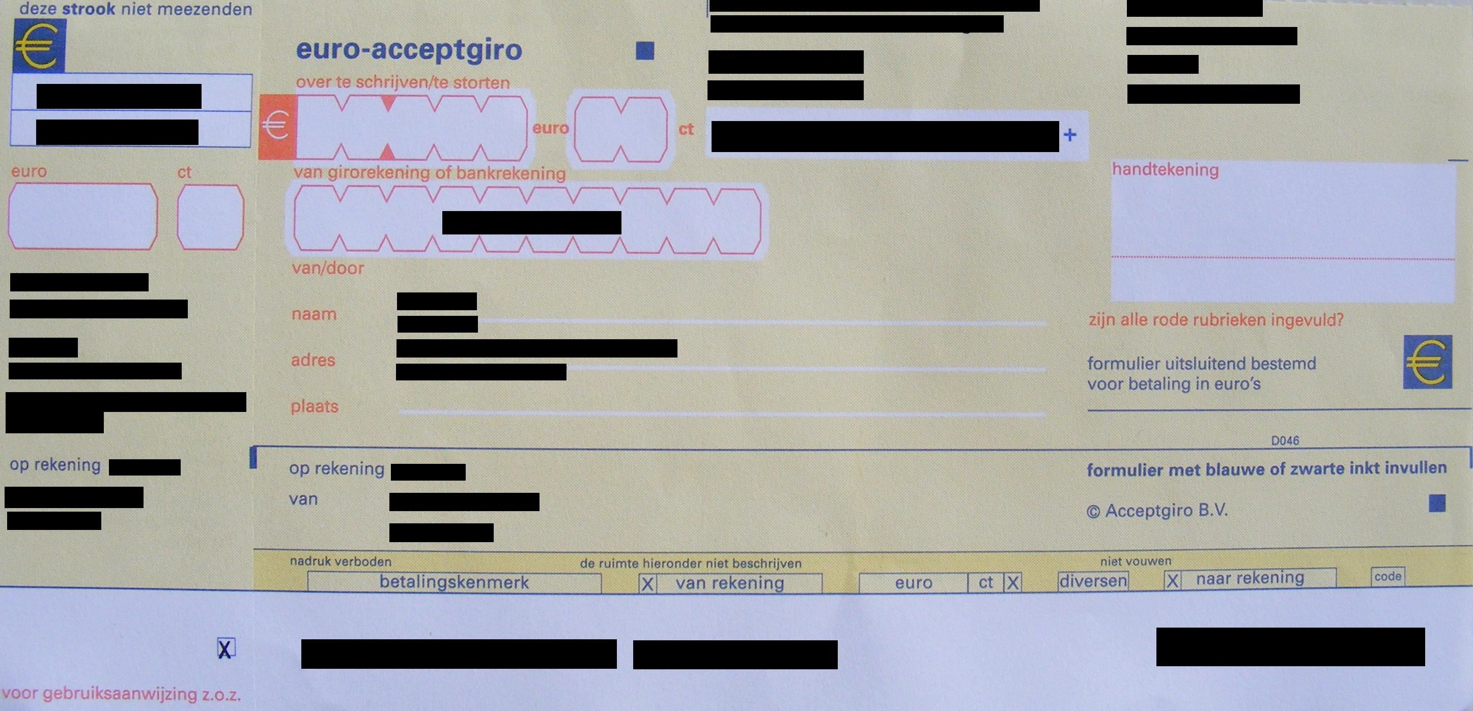 Acceptgiro